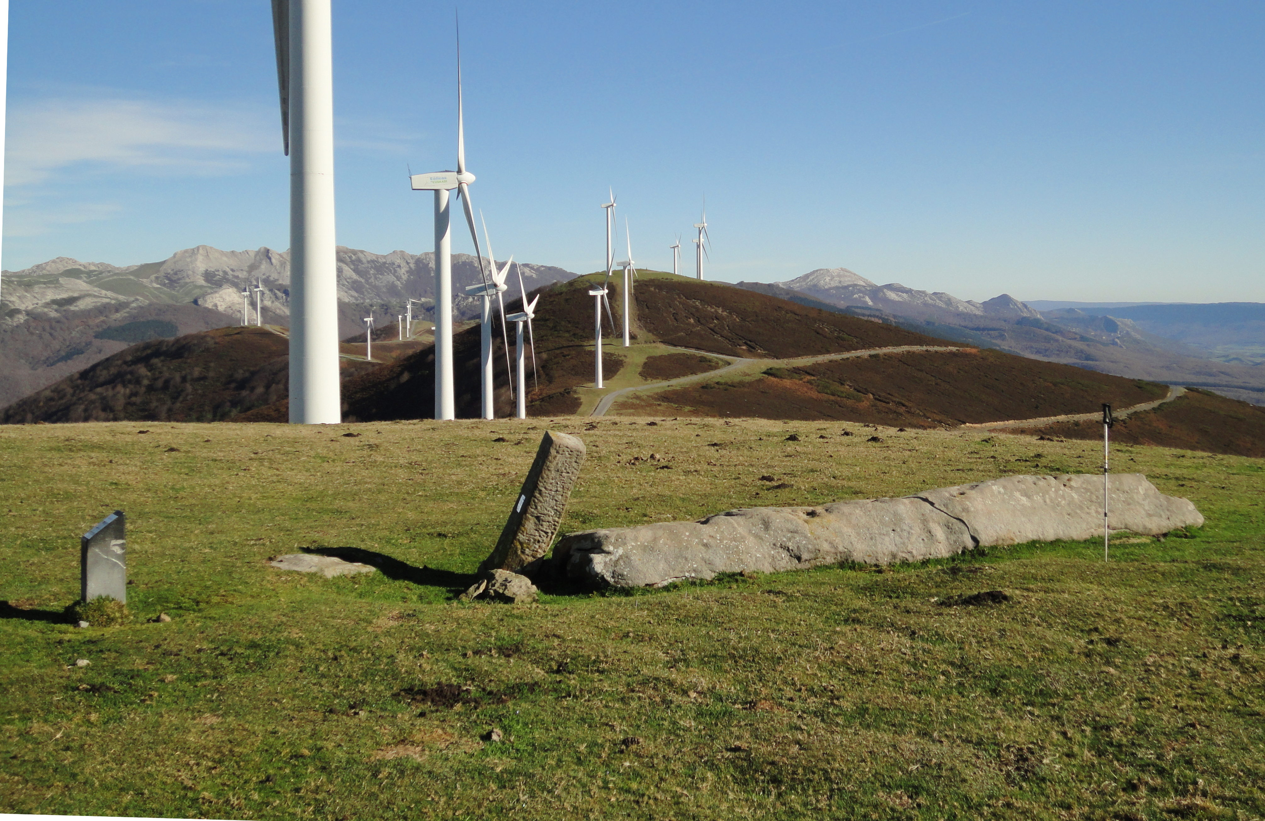 Menhir MugarriaundiEuskara: Mugarriaundi zutarria